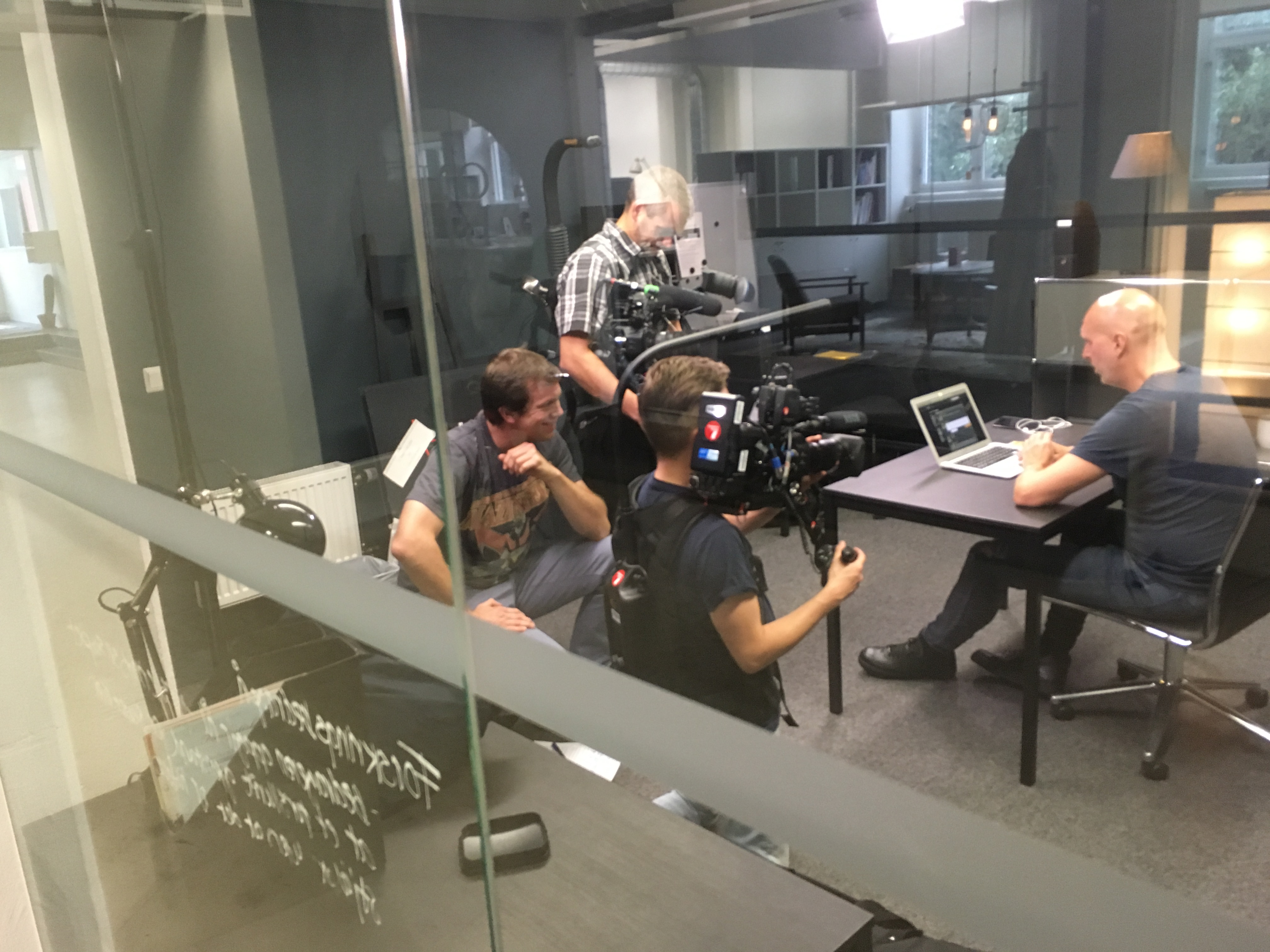 Innspilling av Svindeljegerne, produsert av Monster Entertainment.